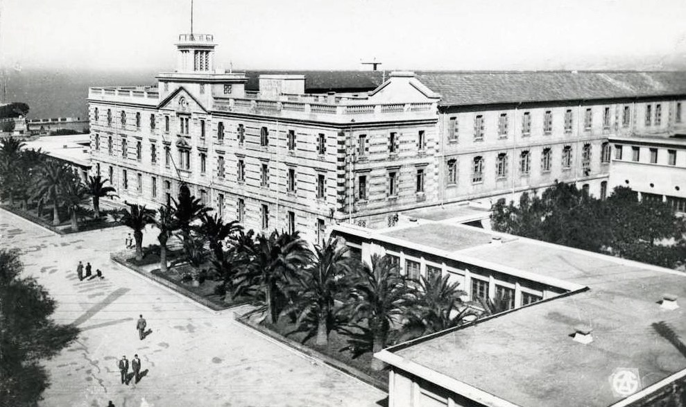 Lycée Lamoricière, Oran, carte postale ancienne